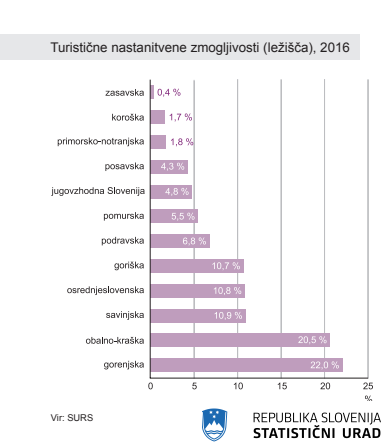 Turistične nastanitvene zmogljivosti (ležišča), 2016